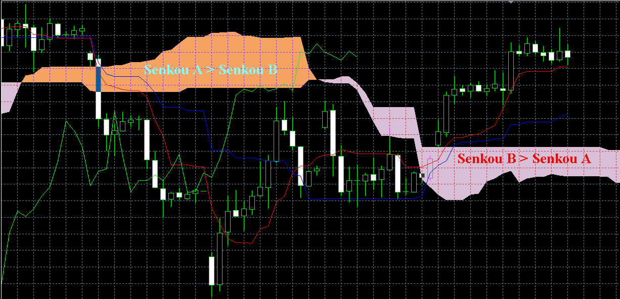 Méthode de Traçage du Senkou Span (Ichimoku Kinko Hyo)